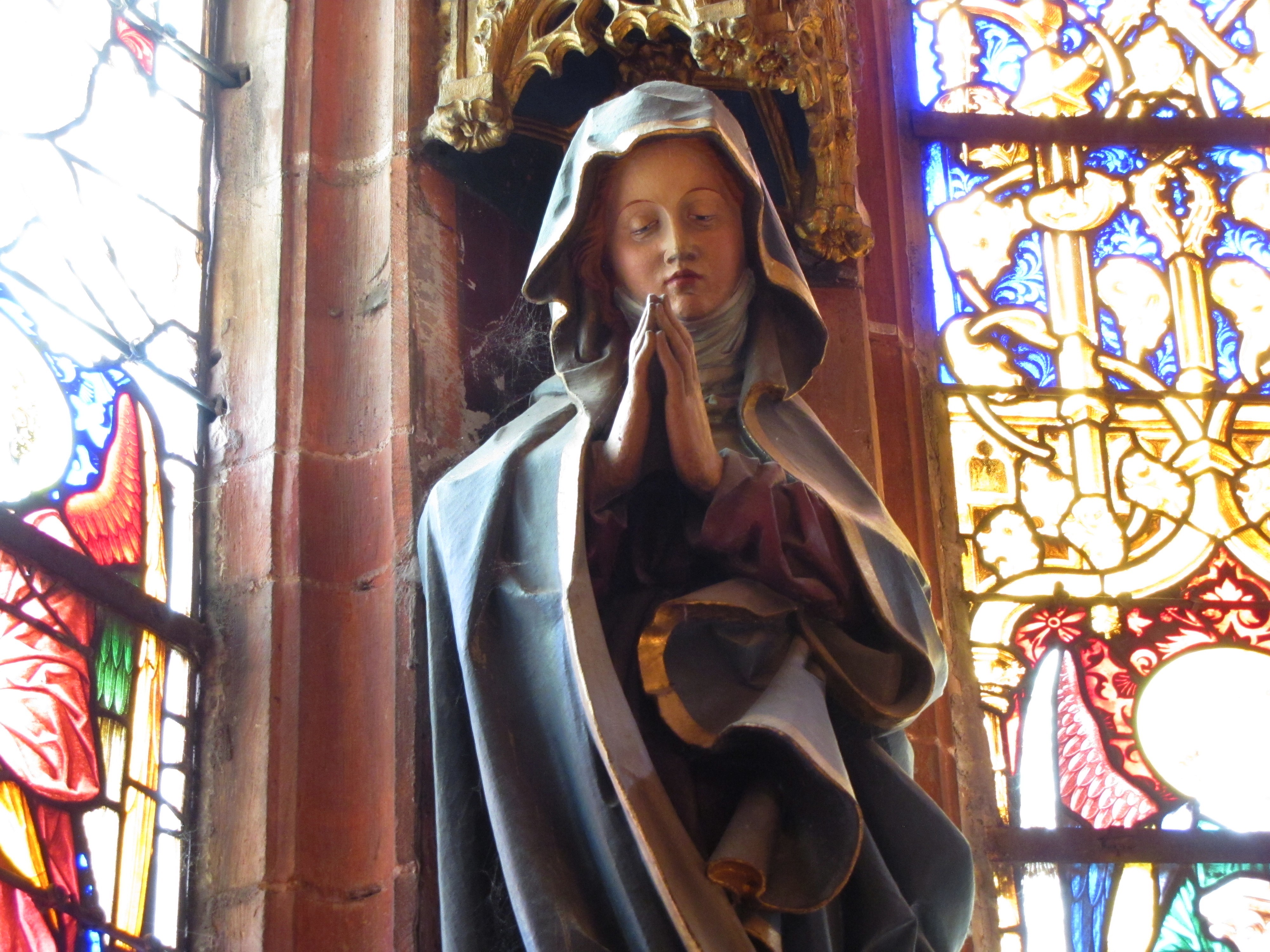 Alsace, Bas-Rhin, Église protestante Saint-Pierre-le-Jeune de Strasbourg (PA00085030).Chapelle de la Trinité: Statue de Marie (Ferdinand Riedel, XIXe)